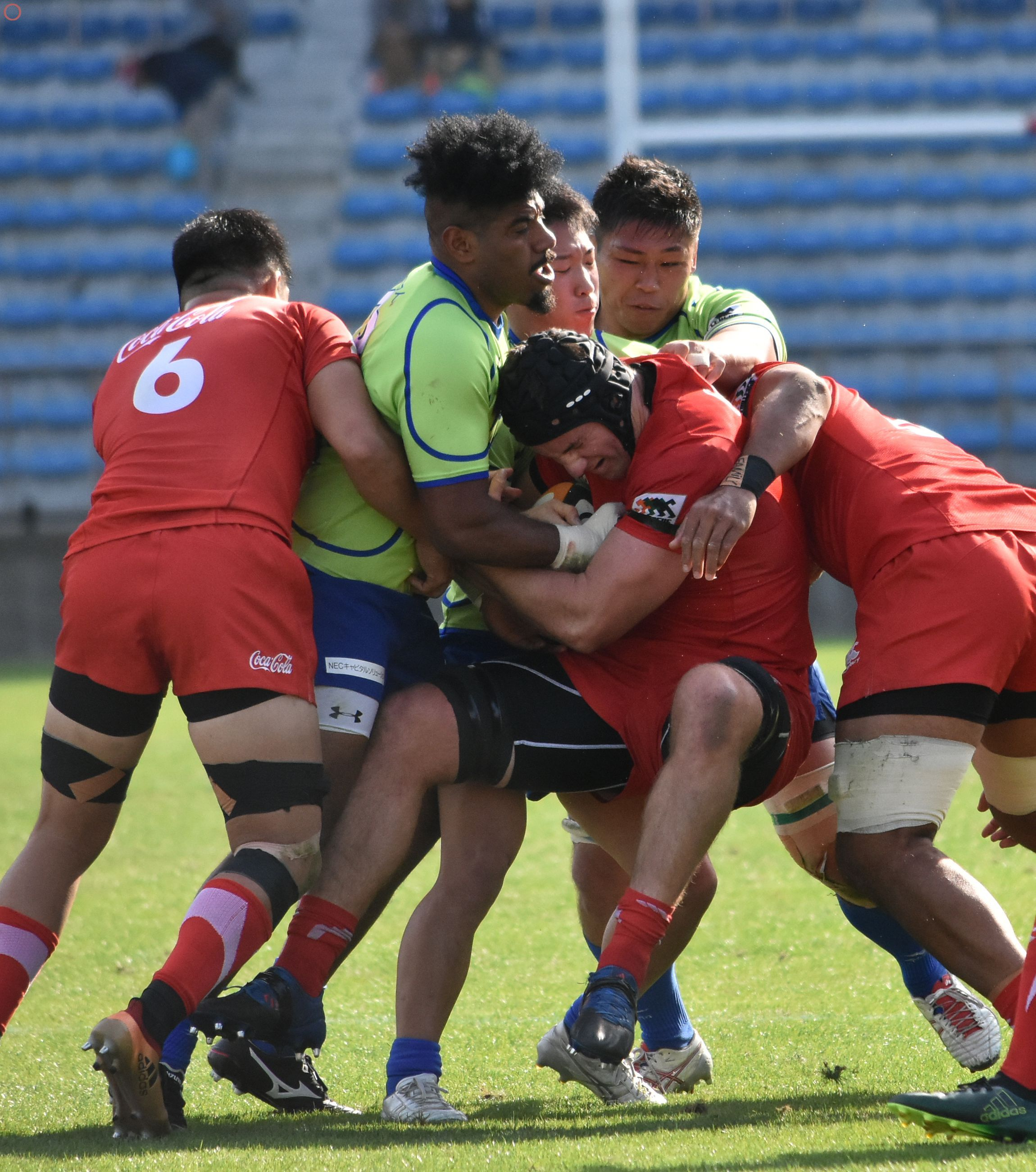 マーク・アボット